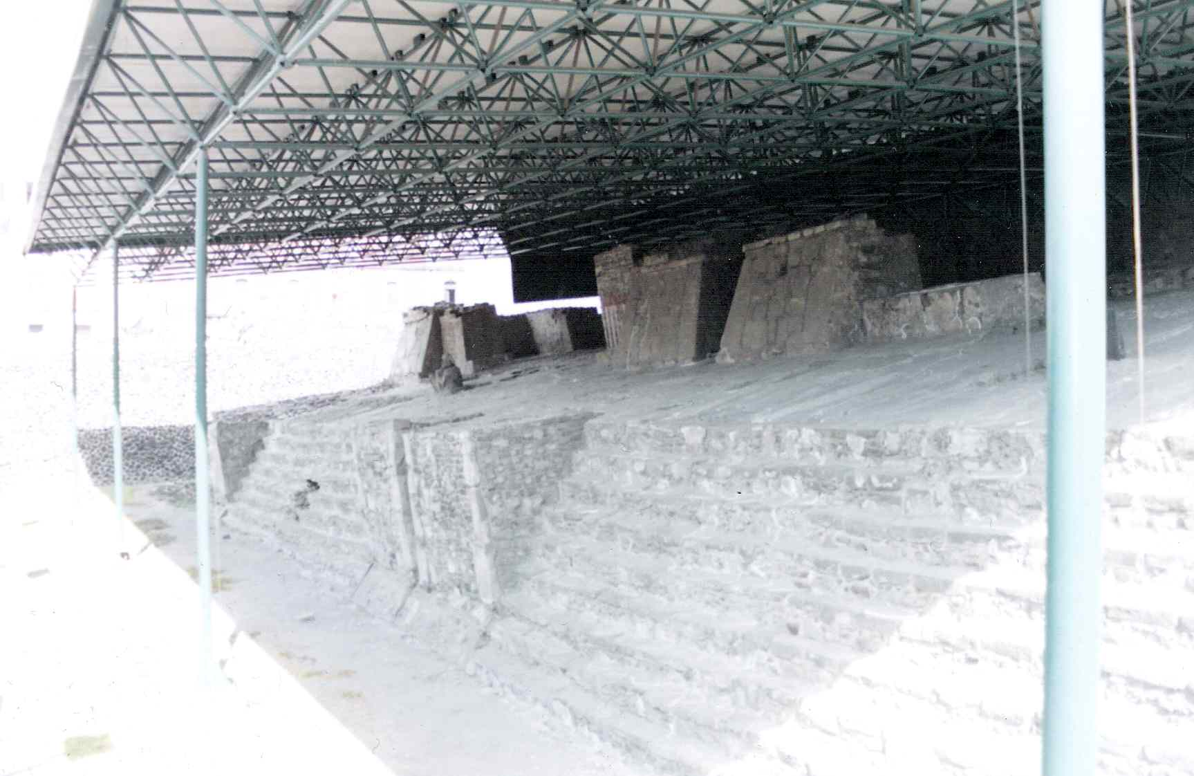 Aqui se muestra lo que queda de las estatuas de tlaloc y huitzilopochtli diciembre 2006